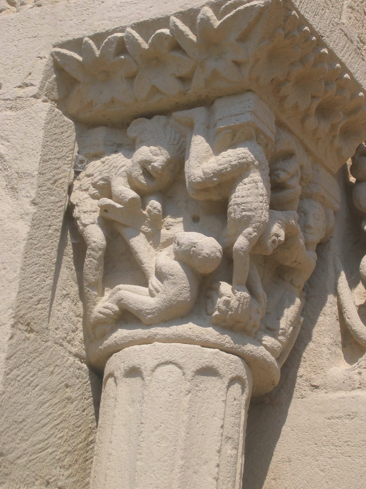 Chapiteau septentrionale du tympan de l'Eglise Ste-Marie-Madeleine (Neuilly en Donjon)